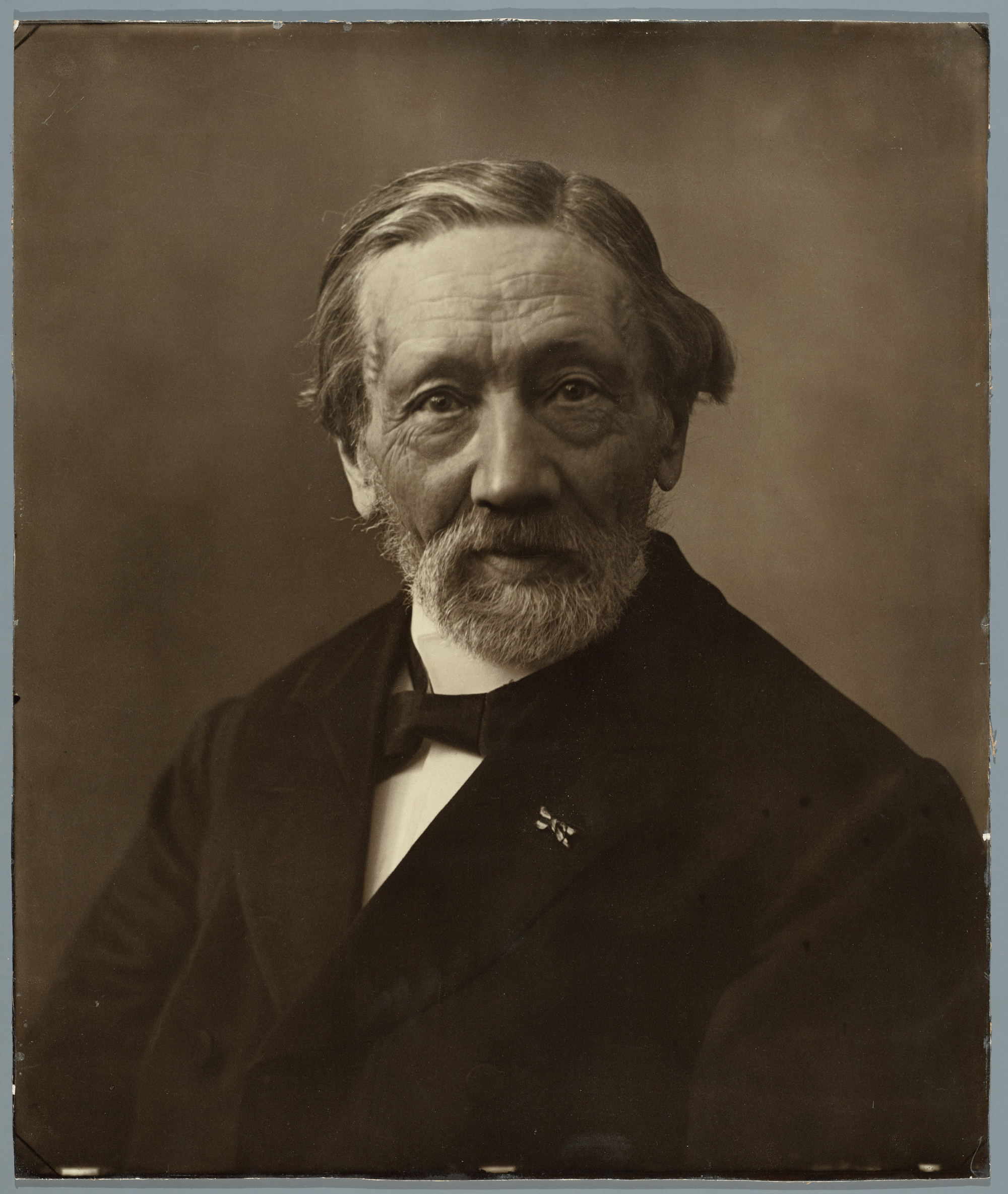 Portret van C.W. Bruinvis rond 1910.